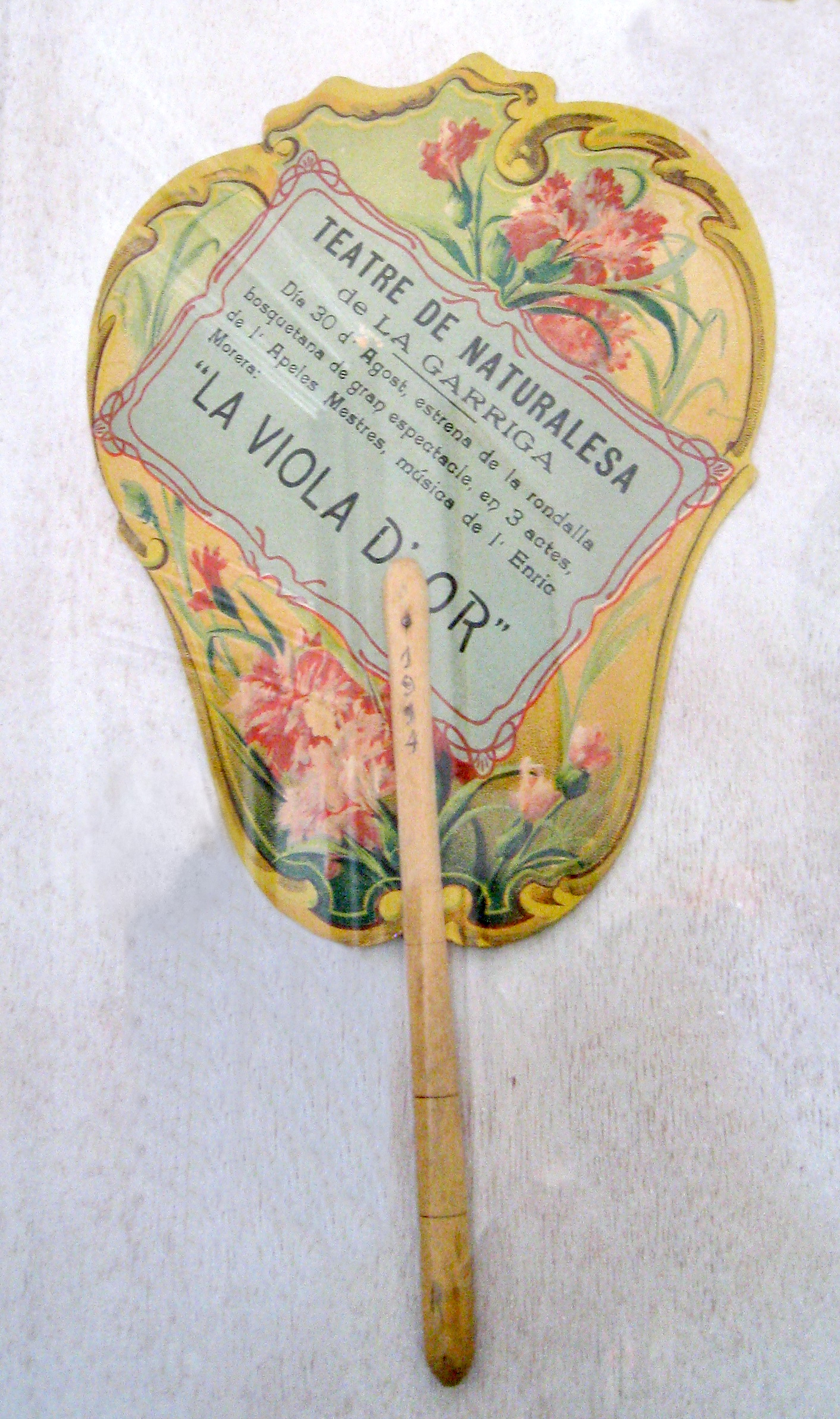 Ventall distribuït al públic al Teatre de la Naturalesa, en l'estrena de l'obra "la viola d'or" d'Enric Morera, el 30-08-1914